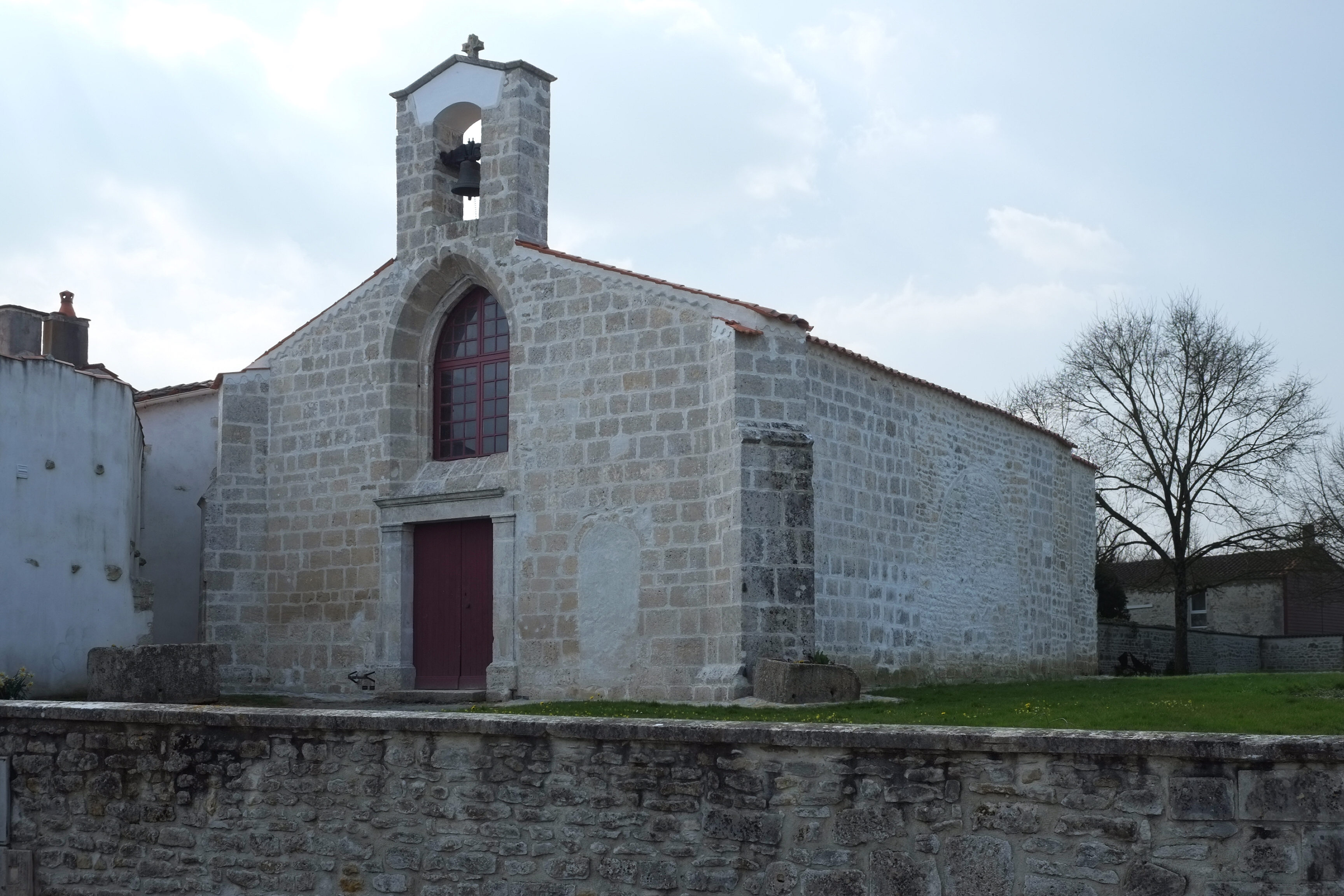 Église Saint-Martin Péré Charente-Maritime France